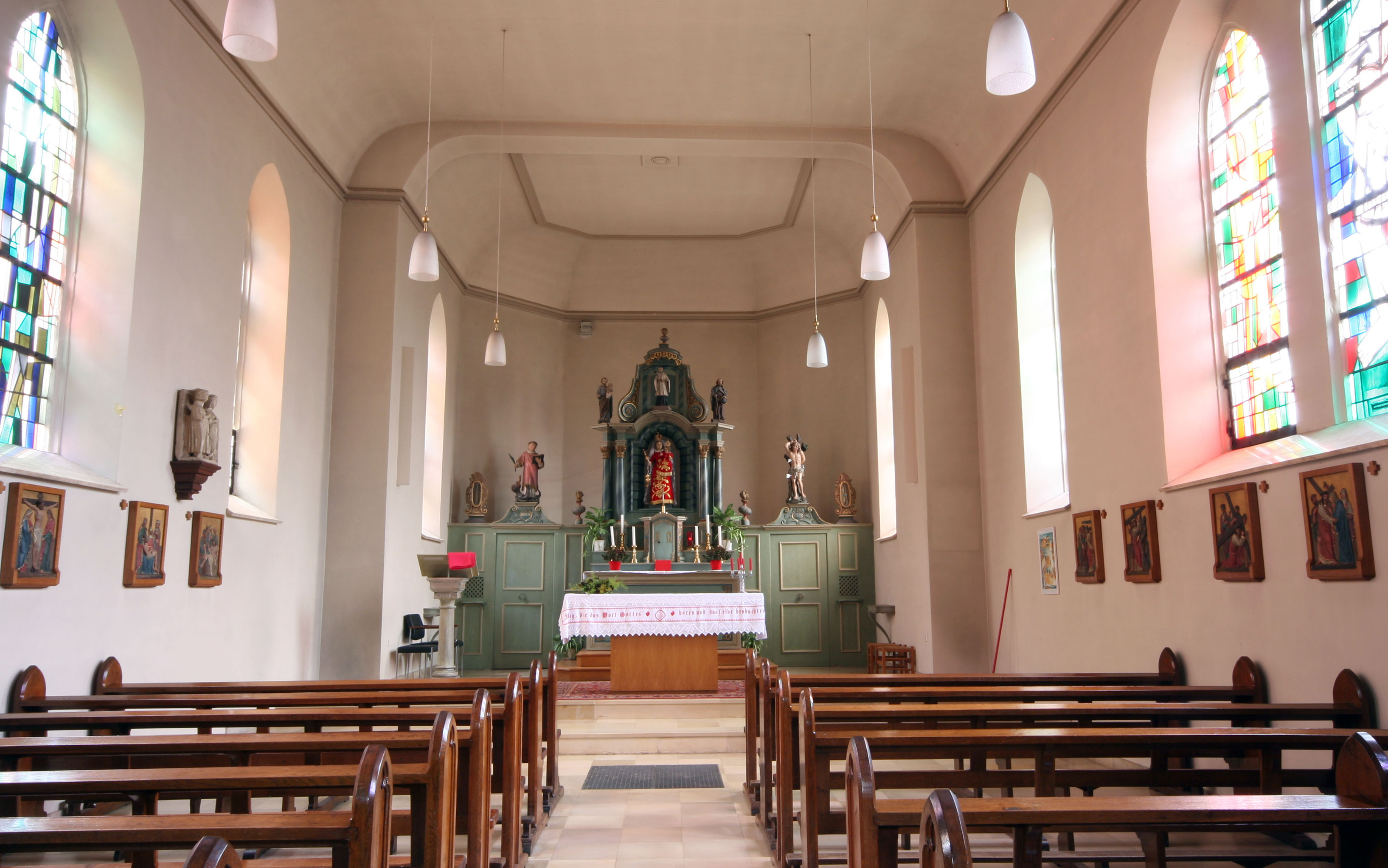 Kierch Huelmes bannen.